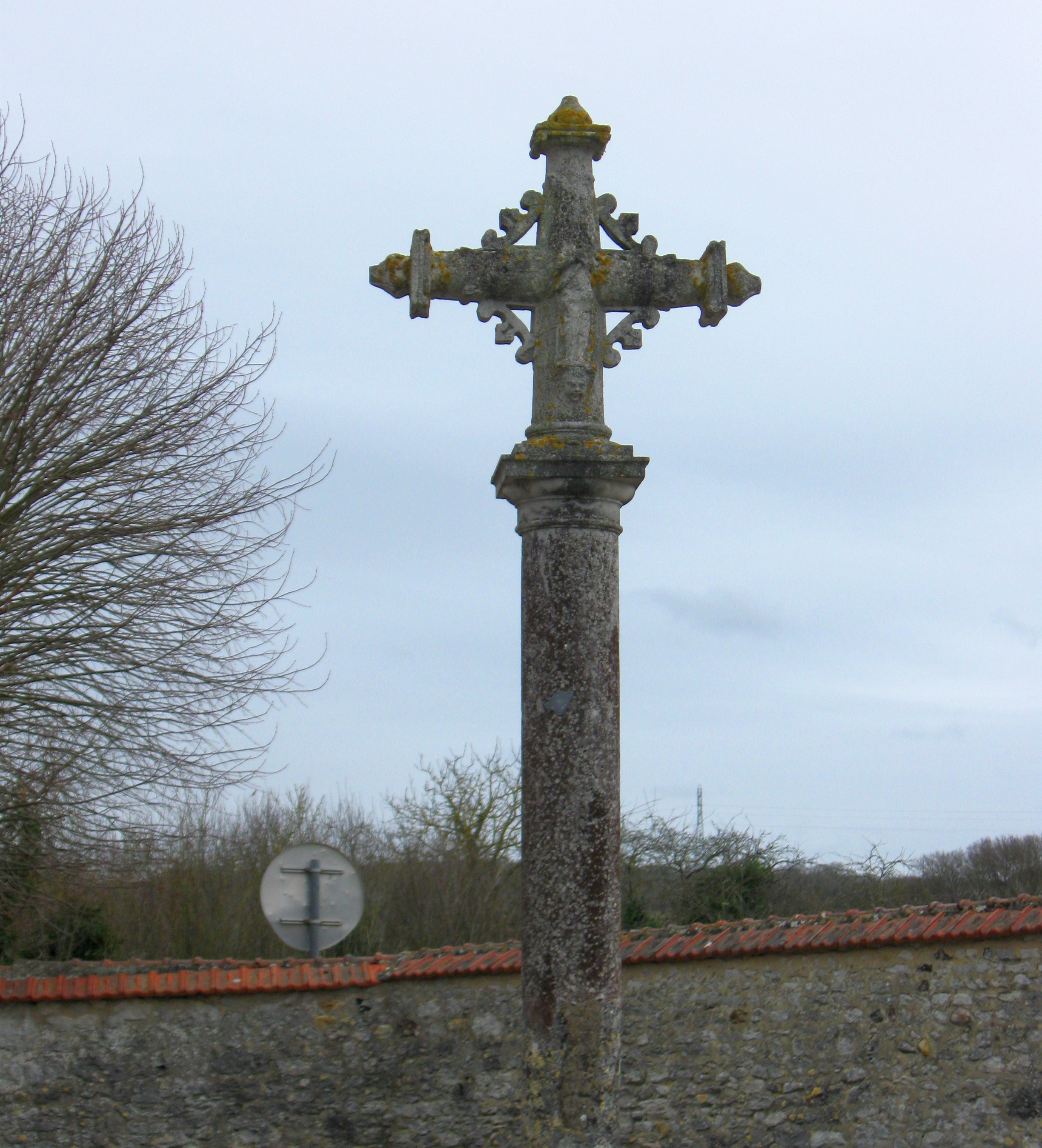 Croix de cimetière à Limetz-Villez. (Yvelines, région Île-de-France).